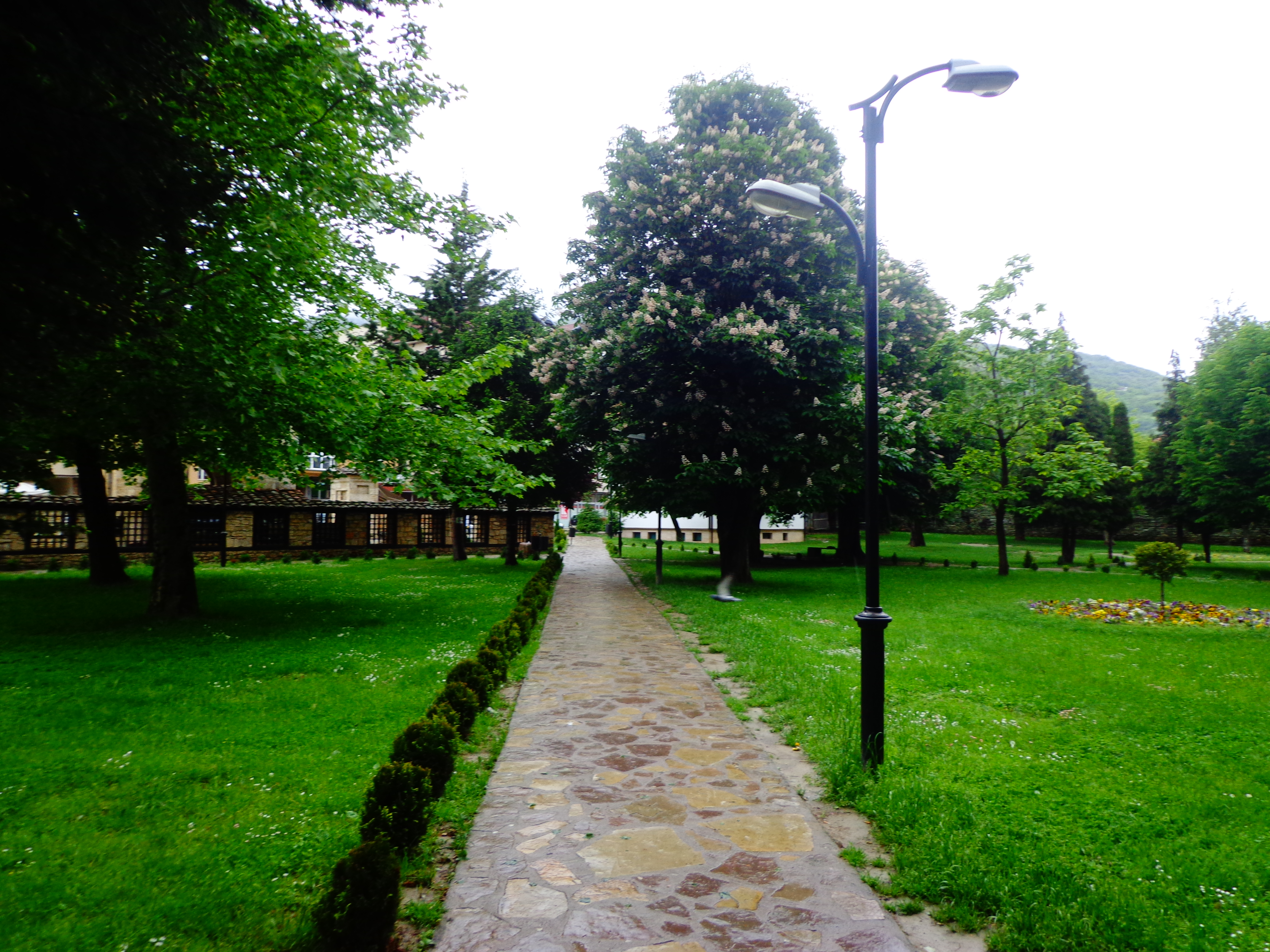 Tetovo, Macedonia (FYROM)